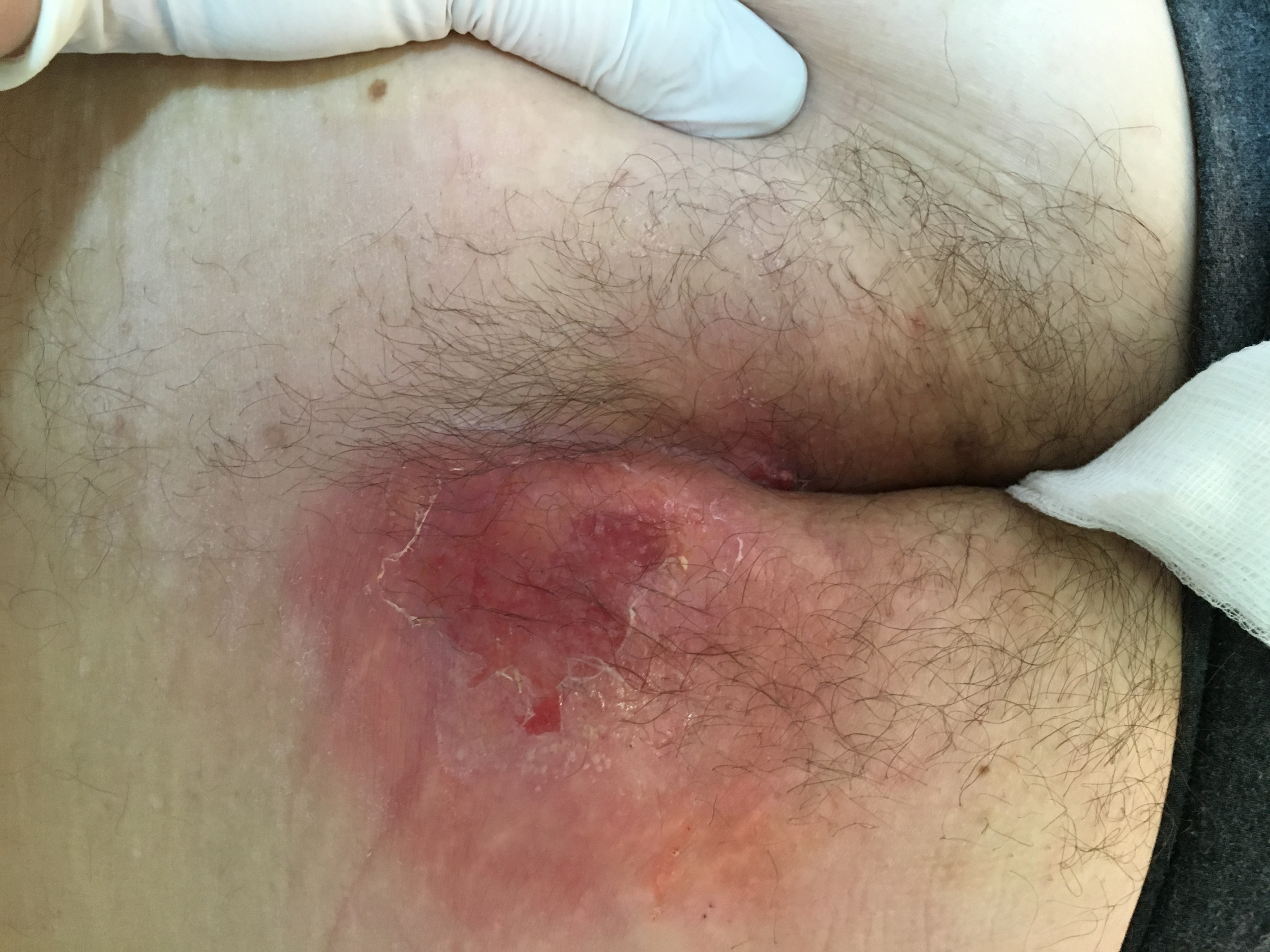 Οξεία φλεγμονή και δημιουργία αποστηματος